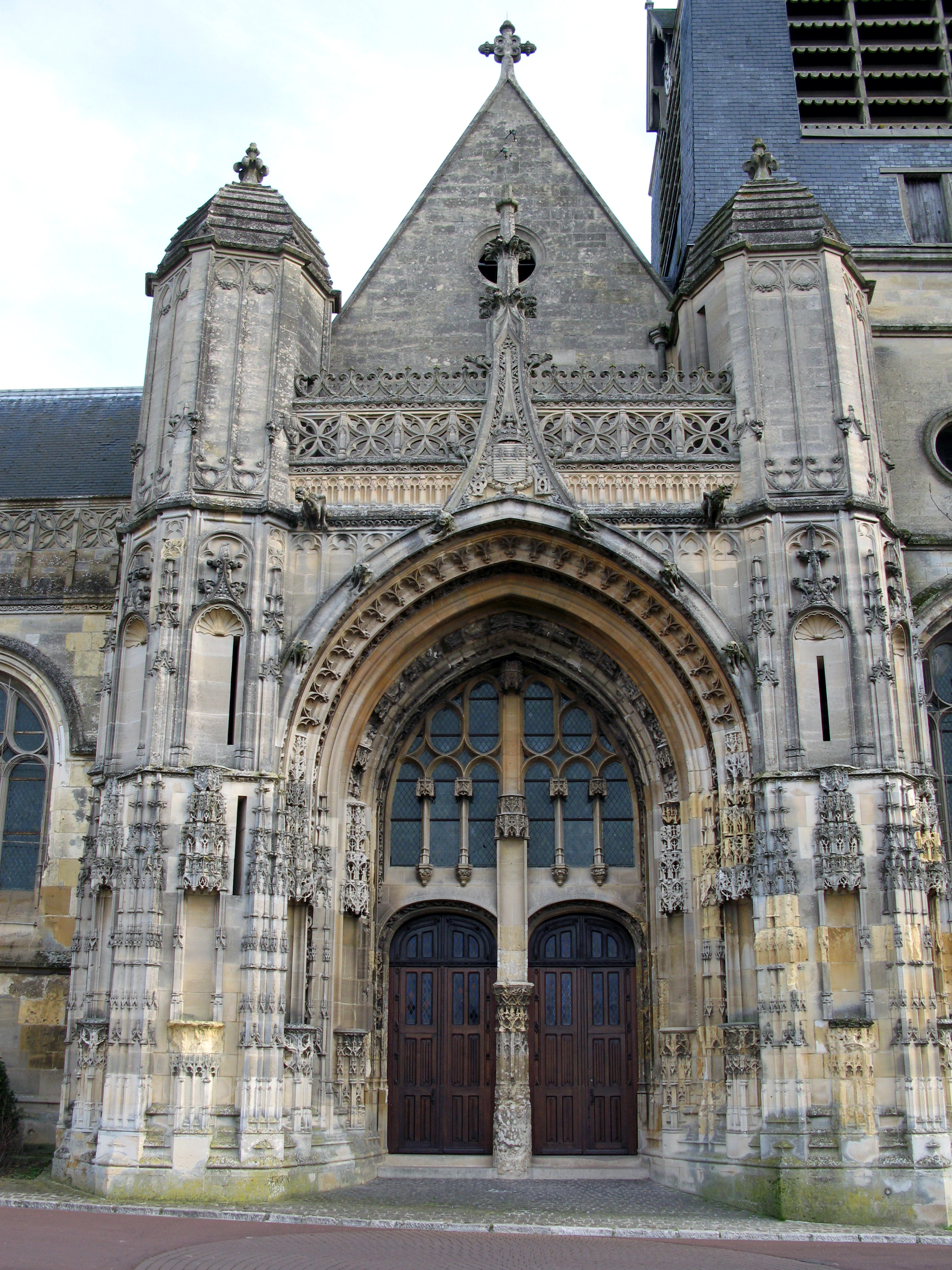 Montdidier (Somme, France) - Le portail de l'église Saint-Pierre (façade Ouest). Le parvis de l'édifice est limité à une petite placette, juste au bord de la falaise, qui permet d'avoir une vue en contrebas sur la vallée. .